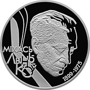 Беларуская (тарашкевіца): Памятная манэта, прысьвечаная 100–годзьдзю з народзінаў Міхася Лынькова